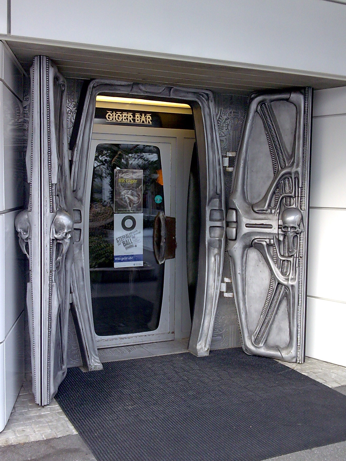 Eingang zu Gigerbar in Chur